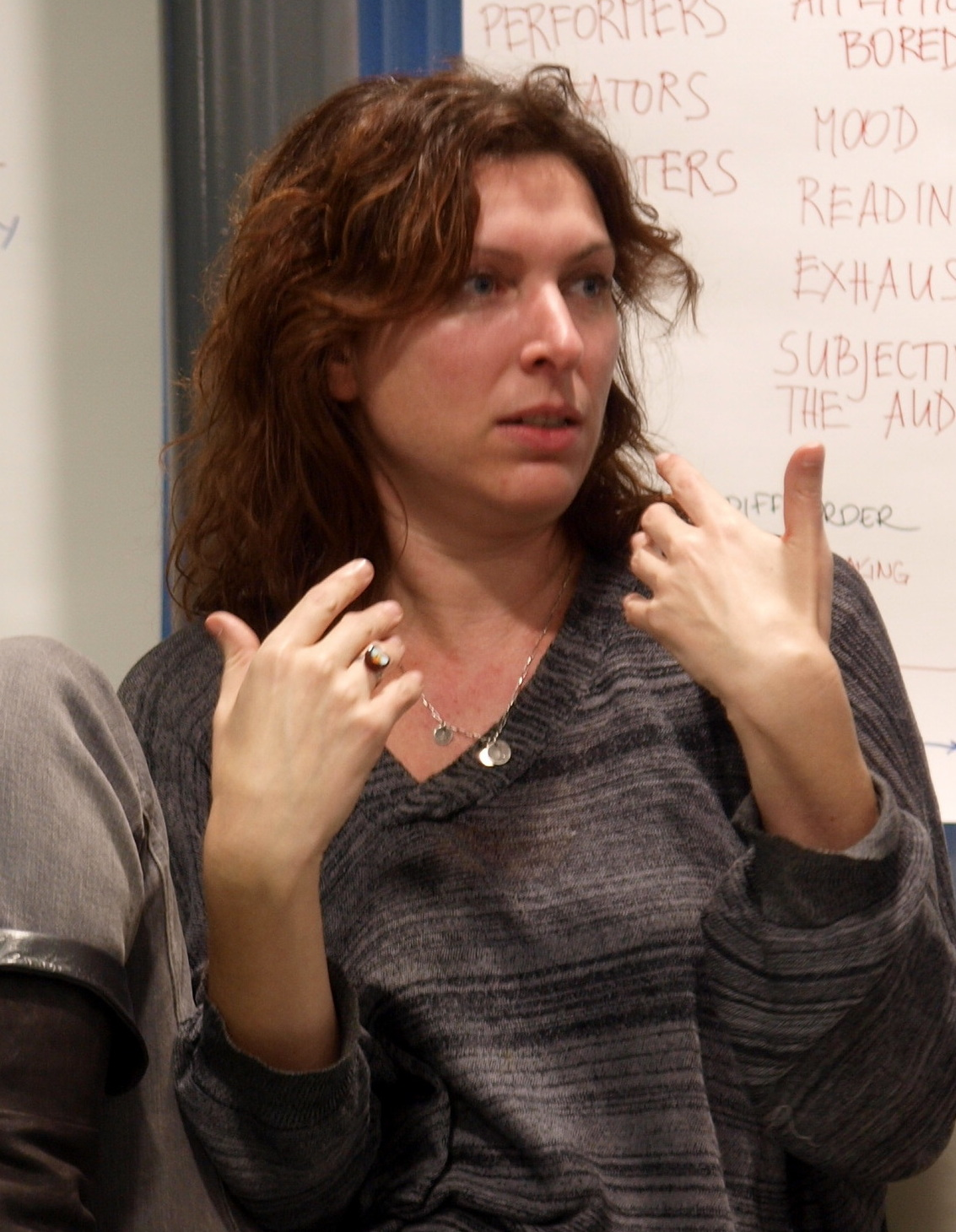 Writer and director Annie Dorsen in 2010